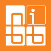 NBB-App Logo